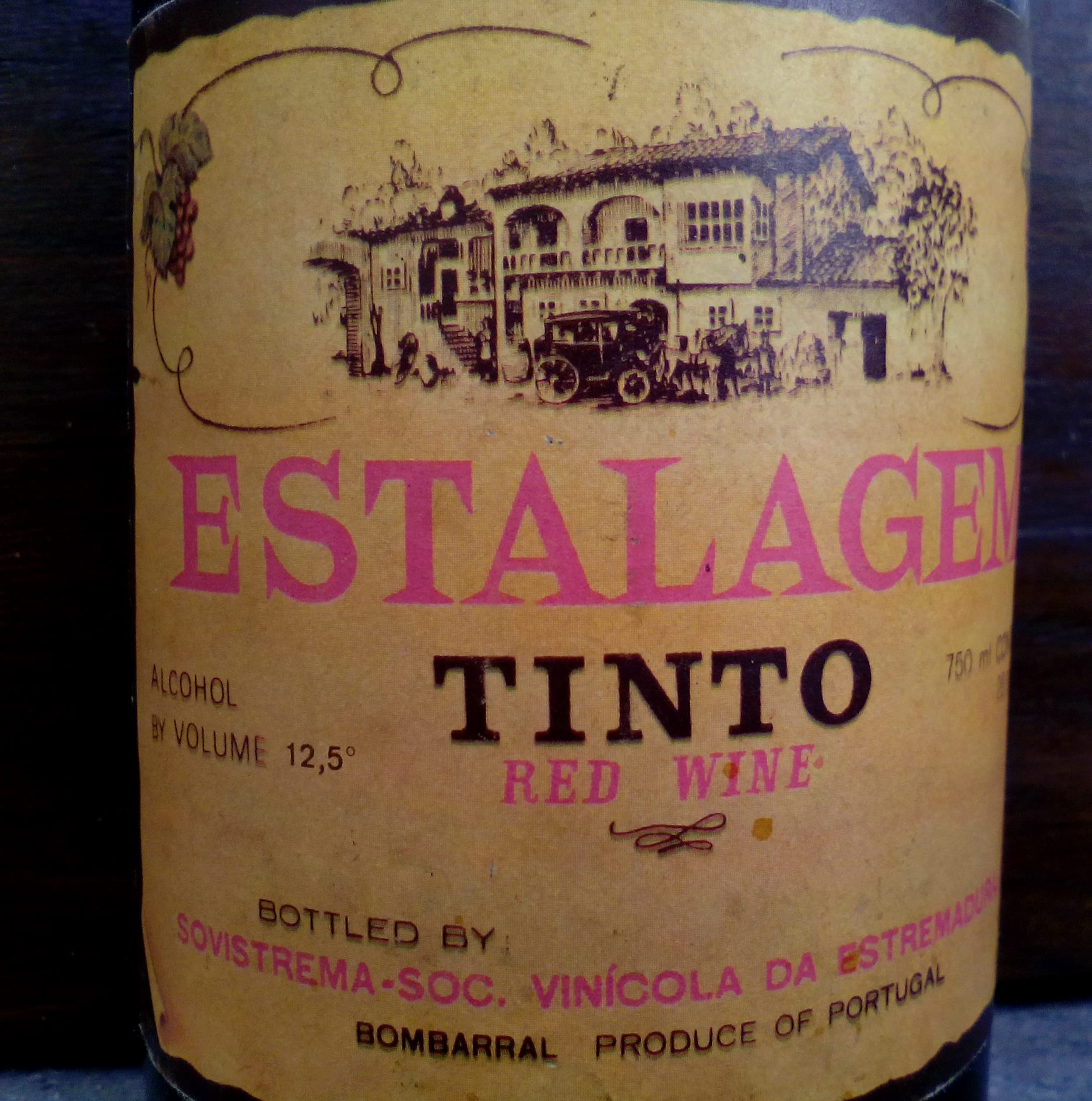 Vinho "Estalagem" tinto da firma Sovistrema, Bombarral